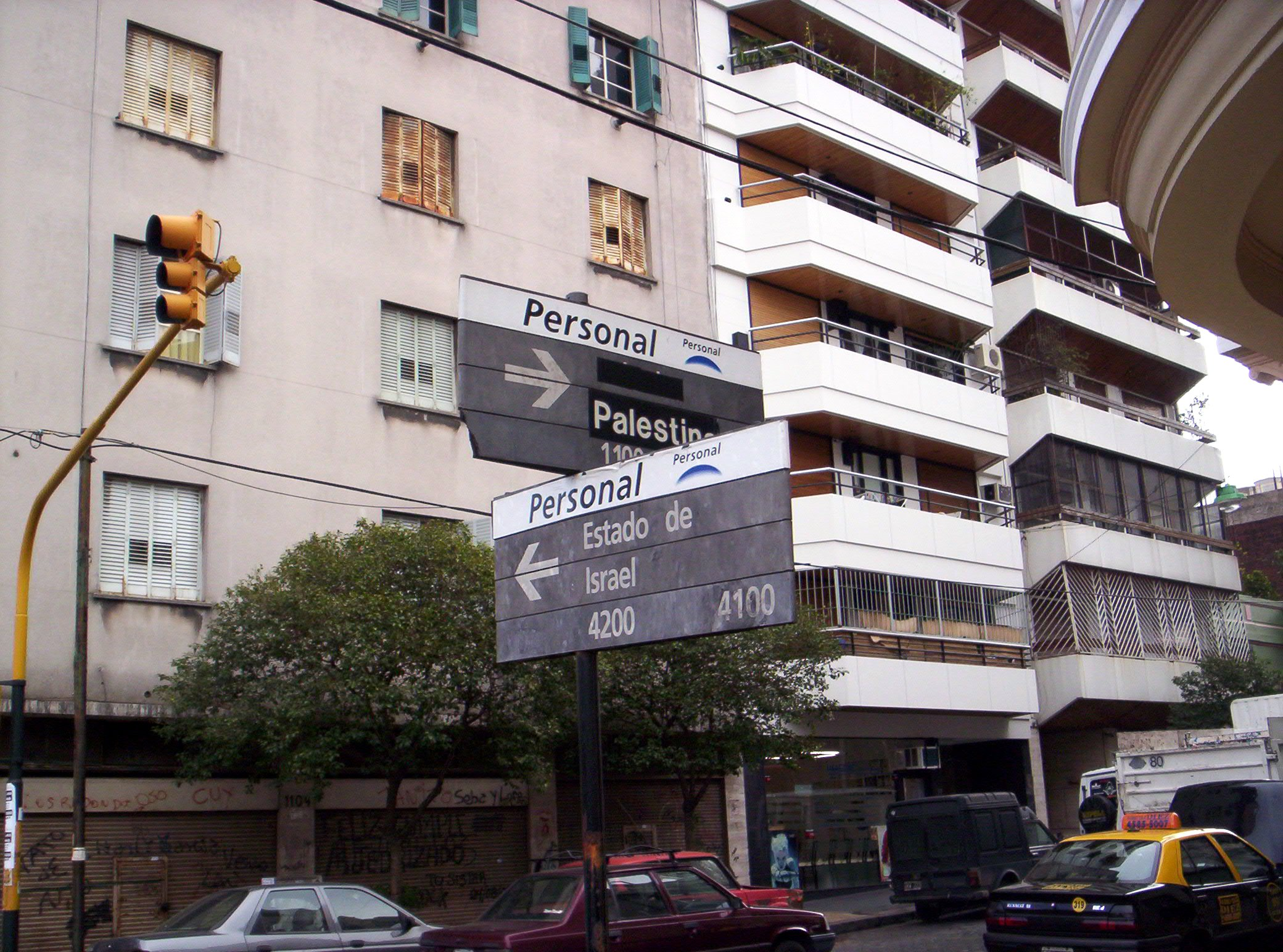 Intersección de las Calles Israel y Palestina, en Almagro, Buenos Aires